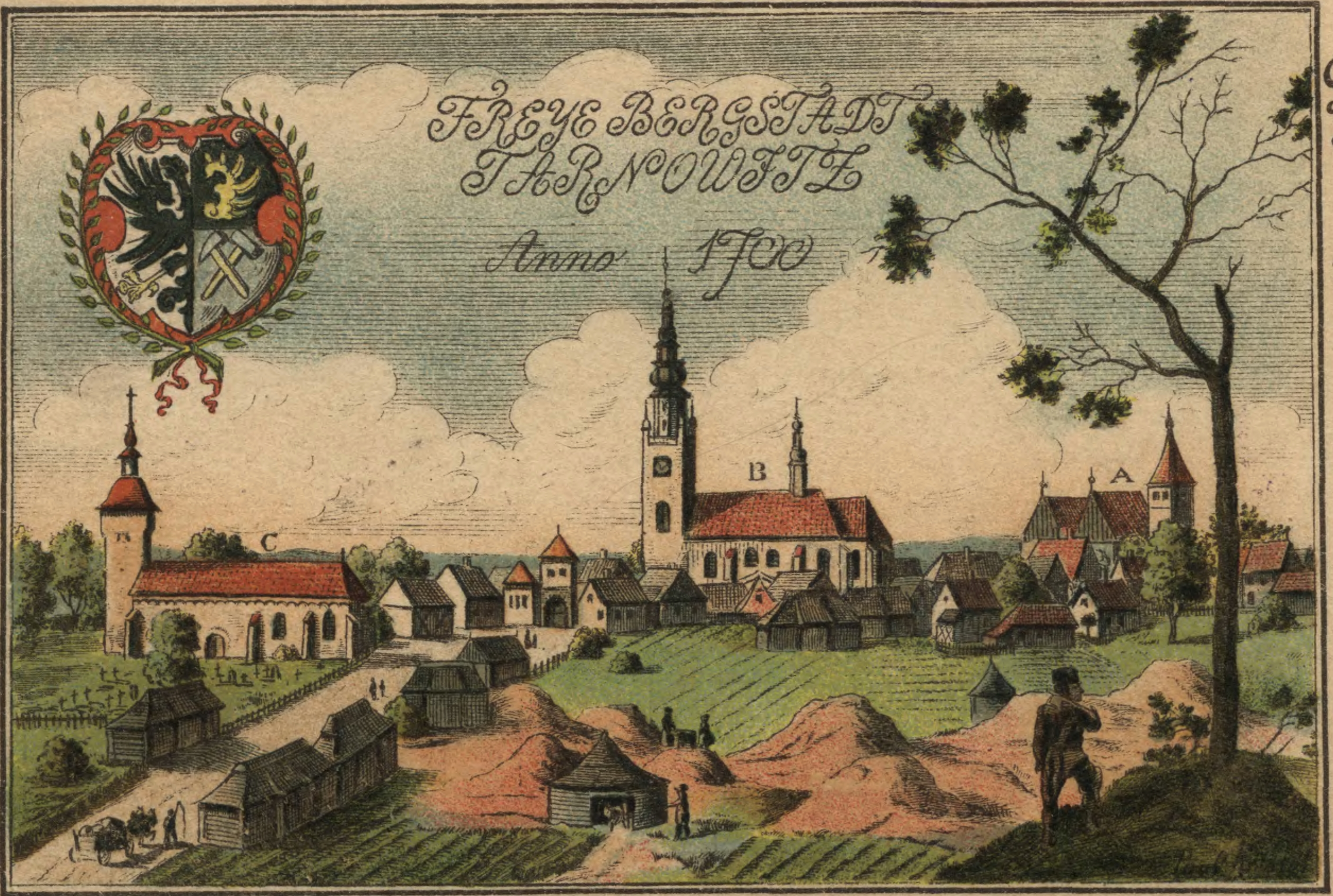 Ansicht der Stadt Tarnowitz in Oberschlesien anno 1700. Gezeichnet von Paul Knötel ca. 1900.